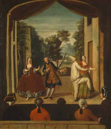 Theaterszene mit Pulcinellen-Darsteller, Venedig um 1780, Öl auf Leinwand, 76 x 64 cm, Theaterwissenschaftliche Sammlung der Universität zu Köln (Schloss Wahn), Inv. Nr. 15374